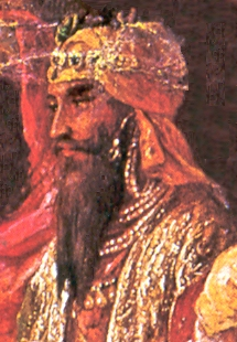 Kharak Singh, Ruler of Sikh Empire.